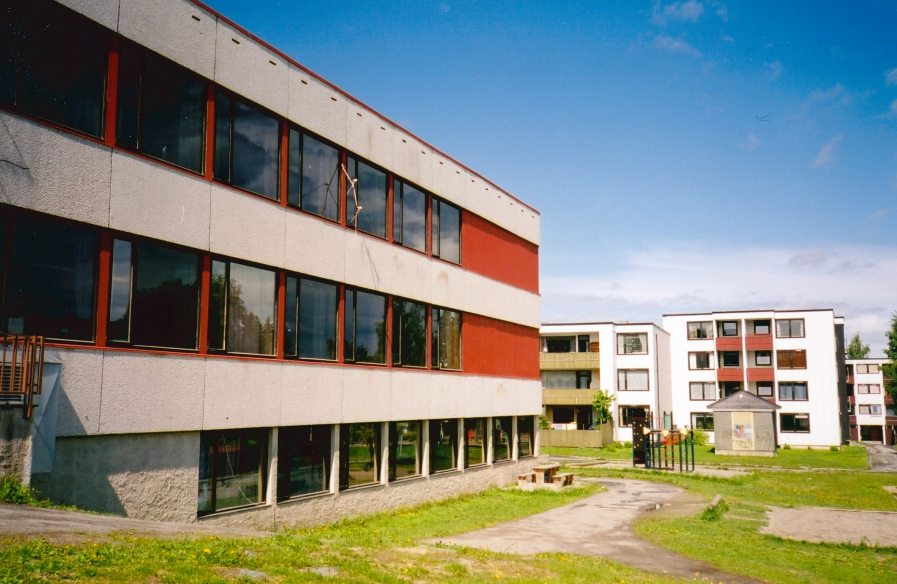 Format: Fotopositiv Dato / Date: 2003 Fotograf / Photographer: Byantikvaren Sted / Place: Saupstadringen 16, Trondheim Wikipedia: Kolstad skole Eier / Owner Institution: Trondheim byarkiv, The Municipal Archives of Trondheim Arkivreferanse / Archive reference: Byantikvaren - Skoler i Trondheim 2003 - A1.S1.BC071 Kolstad skole, Saupstadringen 16, barneskole (1.-7. trinn); 260 elever (2007). Skolebygningen (ark. Ottar Heggenhougen) ble tatt i bruk 1972, samme år som skolekretsen ble opprettet. Kilde: Terje Bratberg: Trondheim byleksikon (Oslo 2008) s. 295.